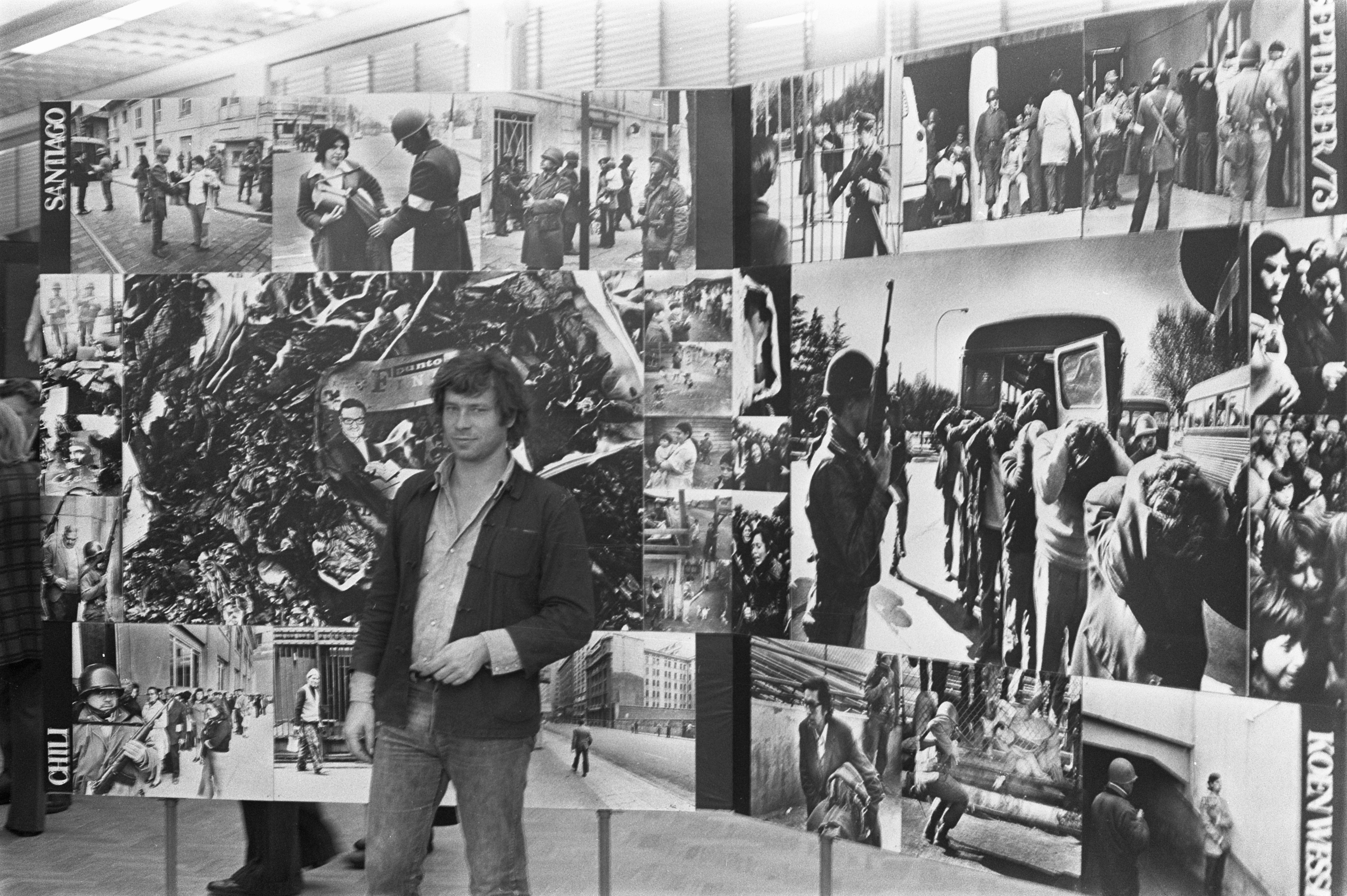 Collectie / Archief : Fotocollectie Anefo Reportage / Serie : Opening van een fototentoonstelling van de GKf (de beroepsvereniging van Beschrijving : Fotograaf Koen Wessing bij zijn fotos van Chili Datum : 26 oktober 1973 Locatie : Amsterdam, Noord-Holland Trefwoorden : foto's, fotografen, fotografie, musea, openingen, tentoonstellingen Persoonsnaam : Wessing, Koen Fotograaf : Fotograaf Onbekend / Anefo Auteursrechthebbende : Nationaal Archief Materiaalsoort : Negatief (zwart/wit) Nummer archiefinventaris : bekijk toegang 2.24.01.05 Bestanddeelnummer : 926-7847